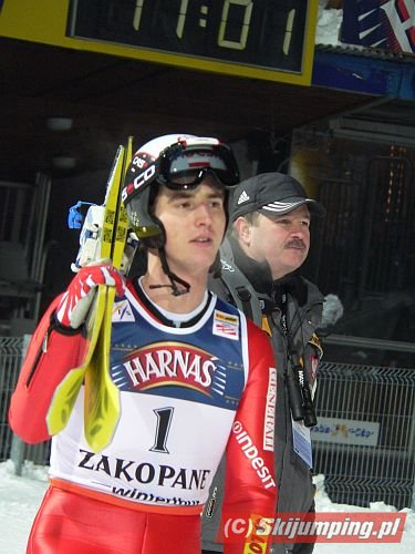 Tomisław Tajner - polski skoczek narciarski podczas Pucharu Świata w skokach narciarskich Zakopane 2006.